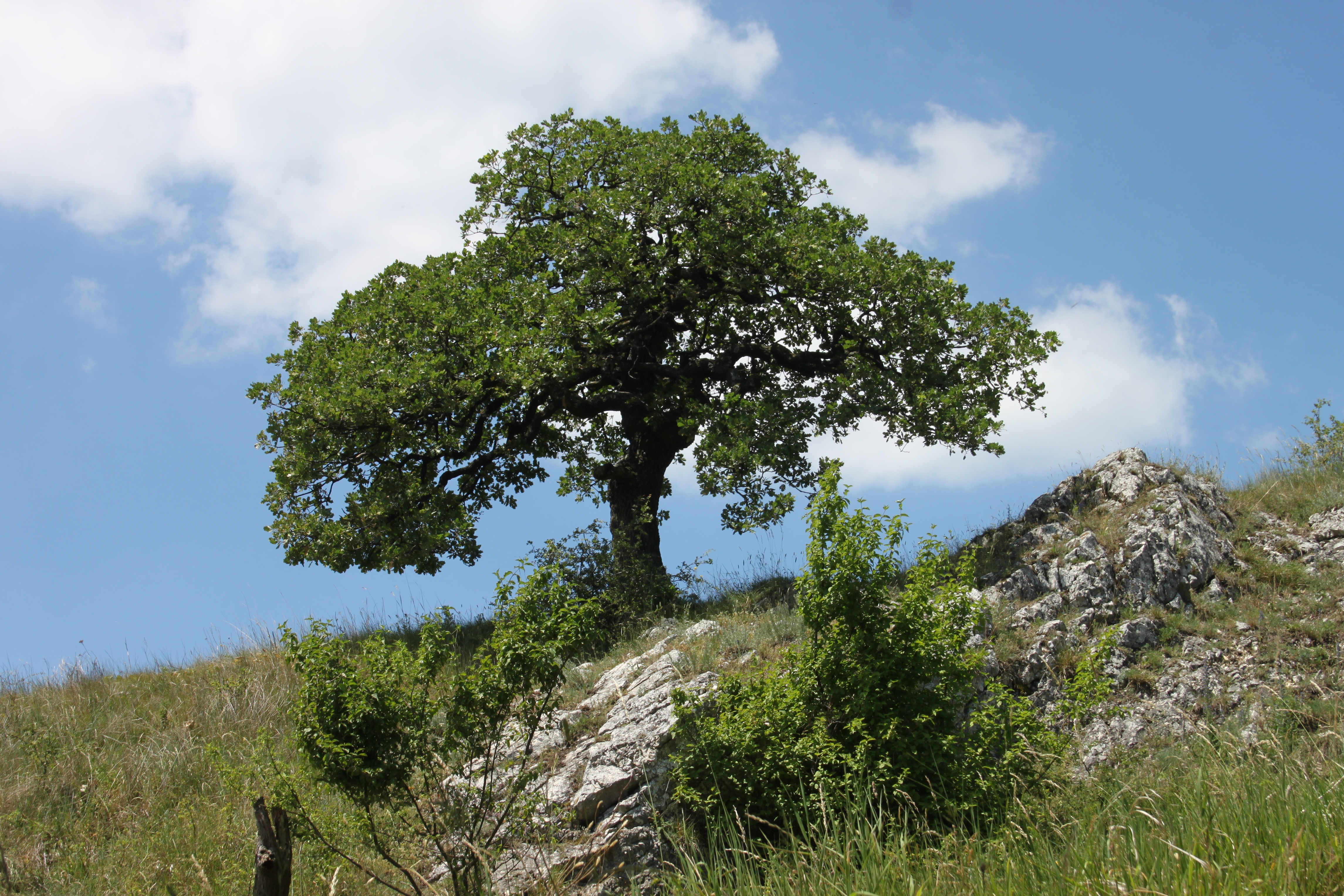 Dub šípák nad Soutěskou, strom zobrazený ve znaku CHKO Pálava